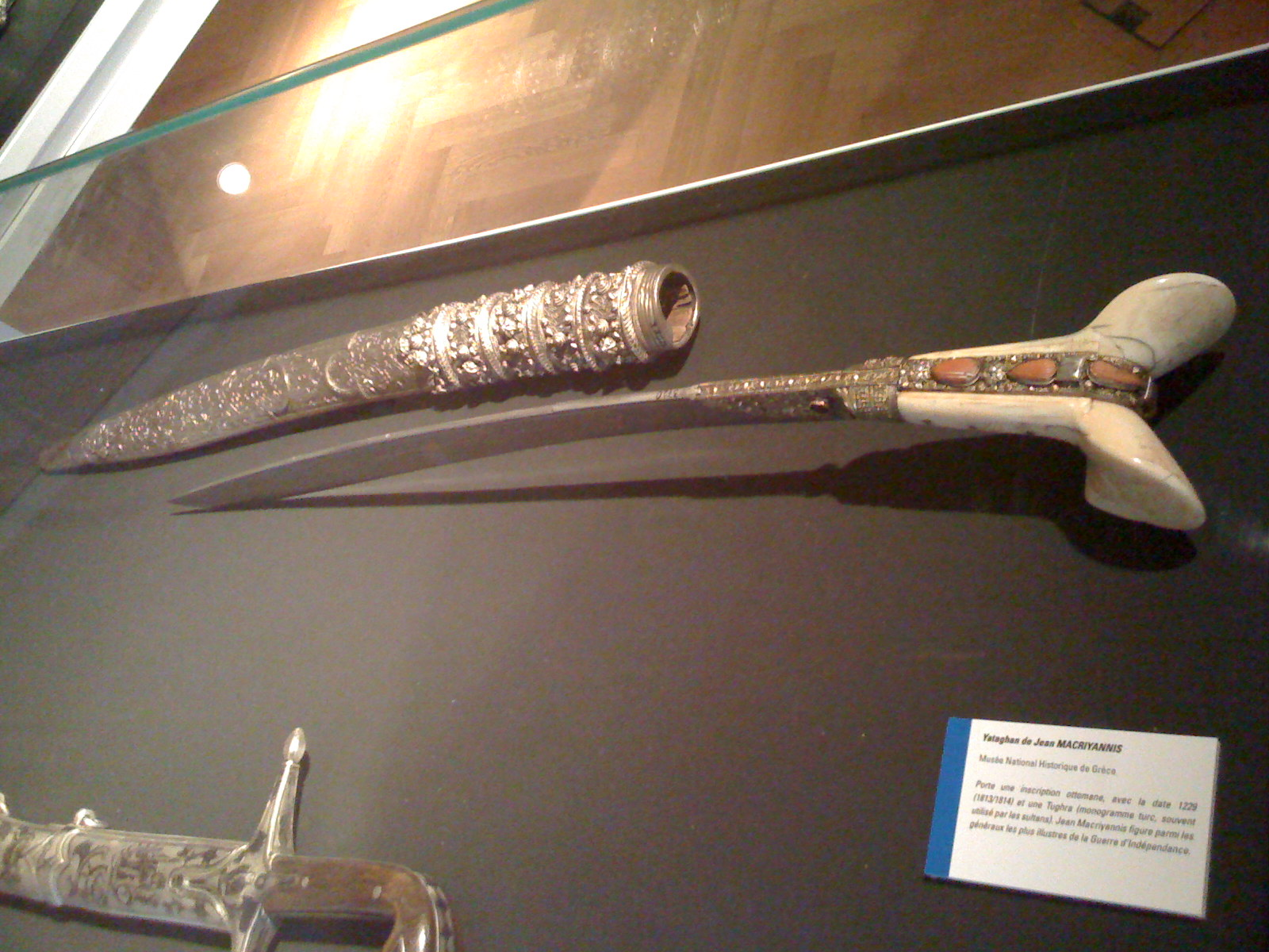 Yatagan de Yánnis Makriyánnis (1797-1864) Pièce du Musée national historique de Grèce exposée à l'Institut et musée Voltaire de Genève (Suisse) Porte une inscription ottomane avec la date 1229 (1813-1814) et une tuğra (monogramme turc souvent utilisé par les sultans)